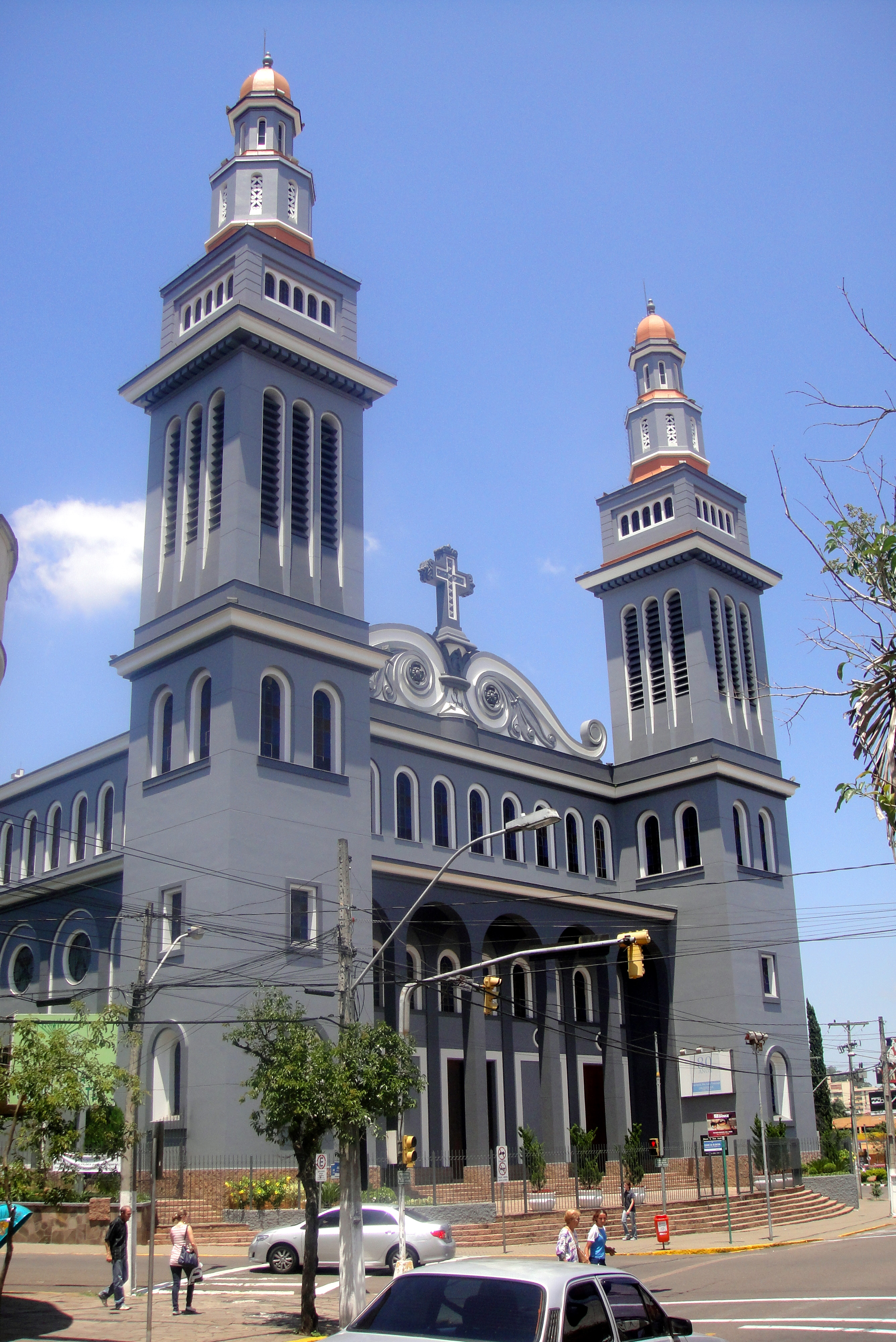 Catedral Basílica São Luis Gonzaga